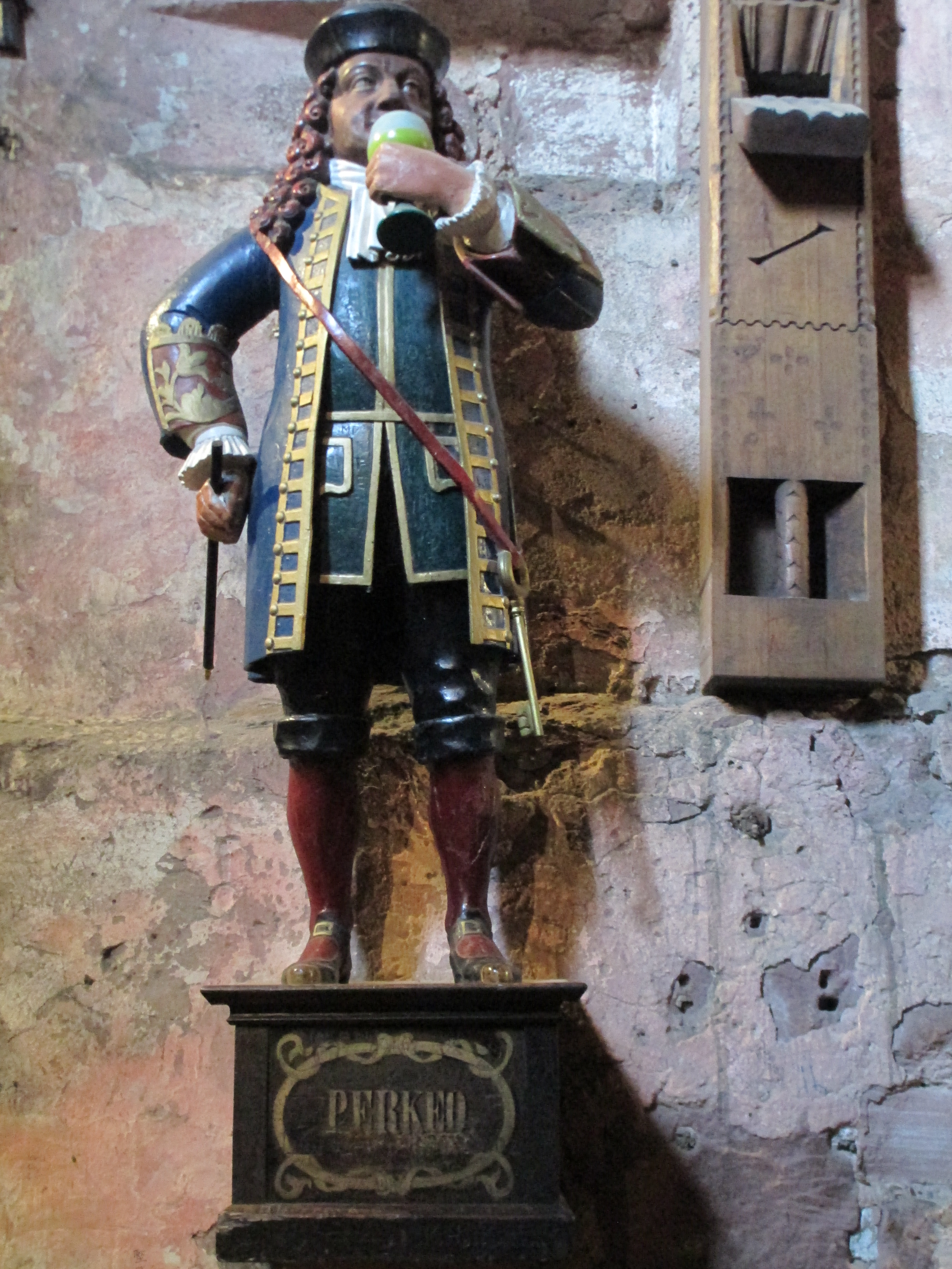 פרקאו ליד חבית היין הגדולה בטירת היידלברג